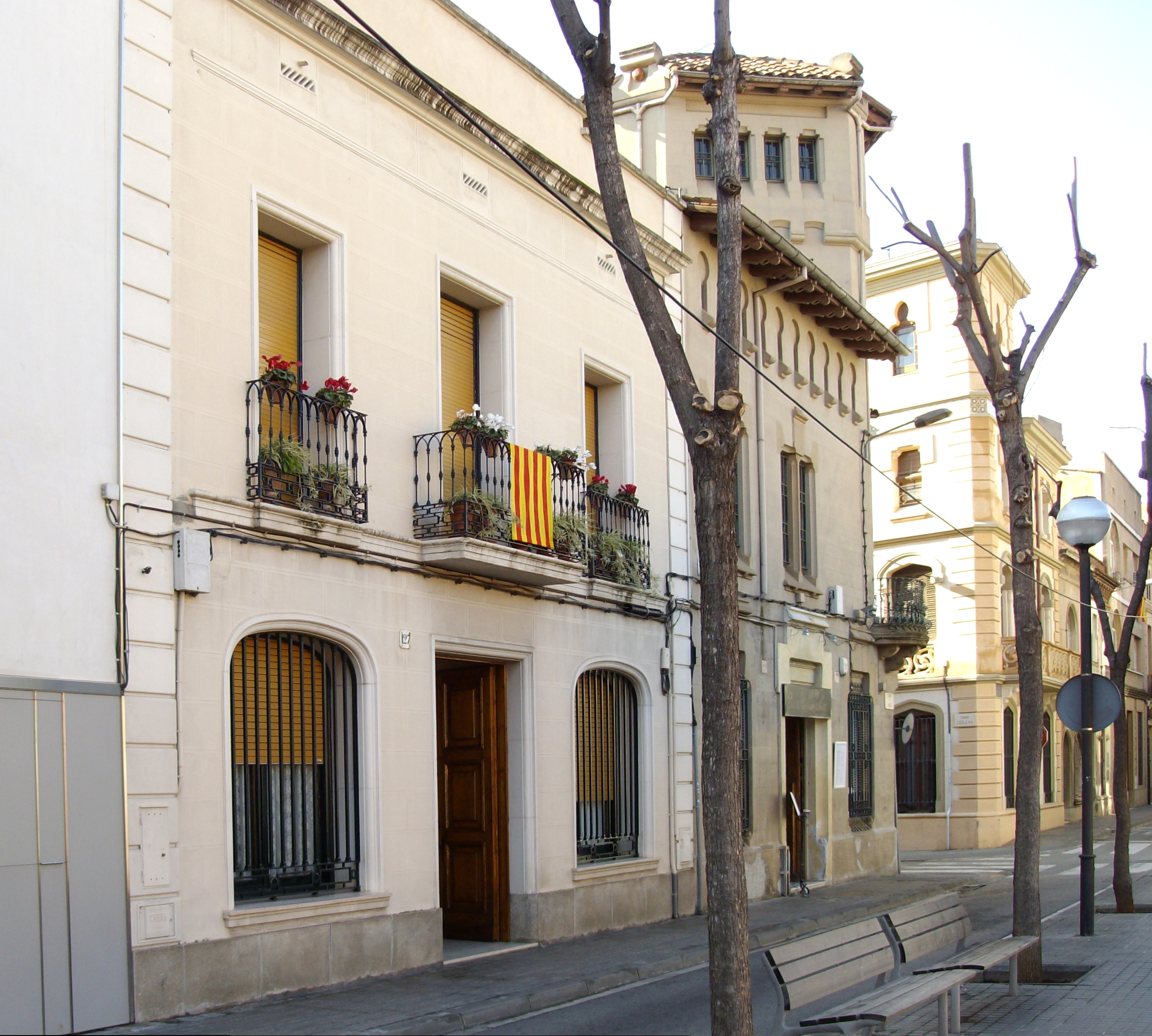 Casa de la familia Batllevell, construida en 1863 por Gabriel Batllevell i Tort, situada en la calle Gràcia, 127, en Sabadell, Barcelona (España).